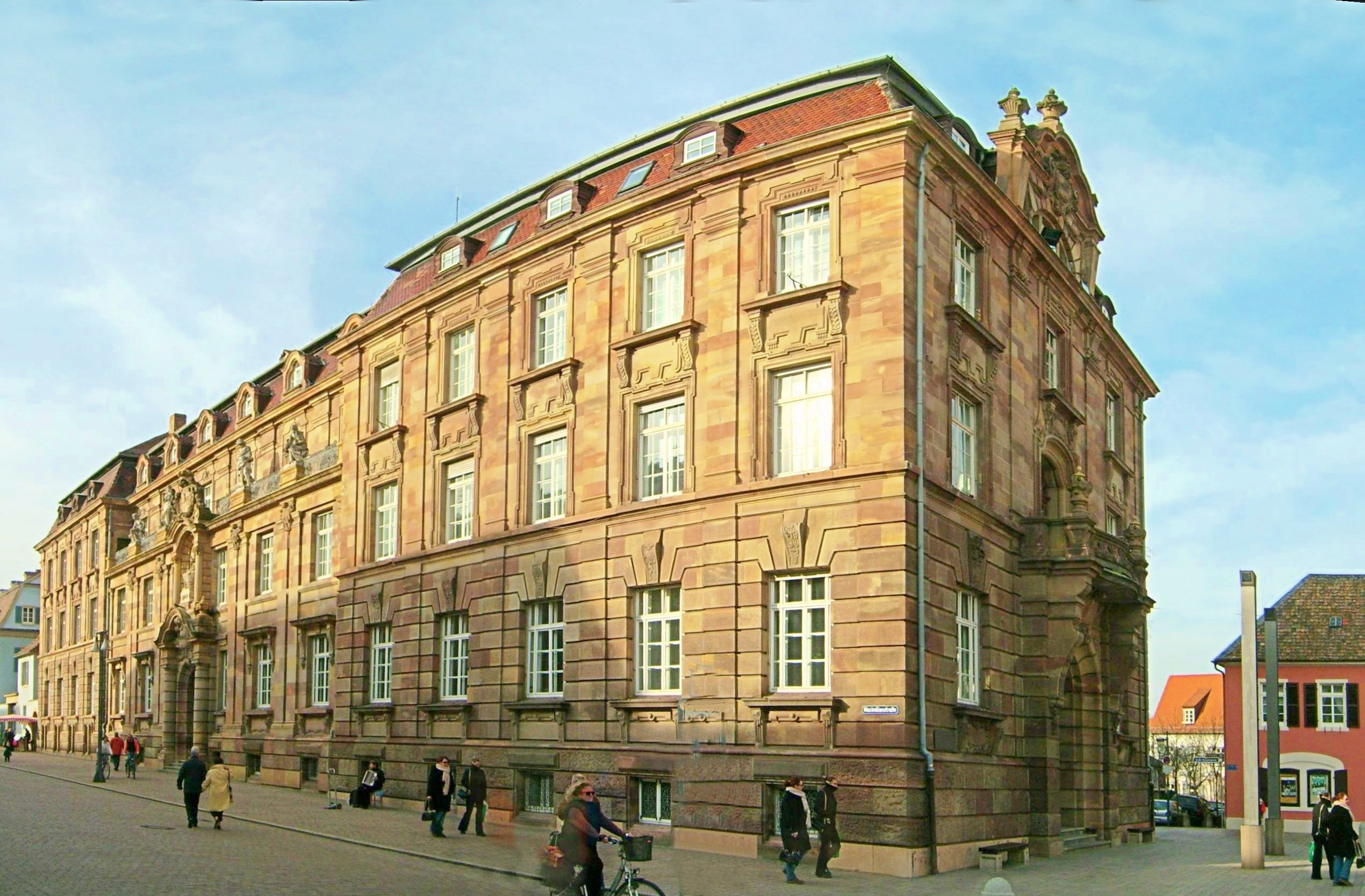 Panorama in Speyer